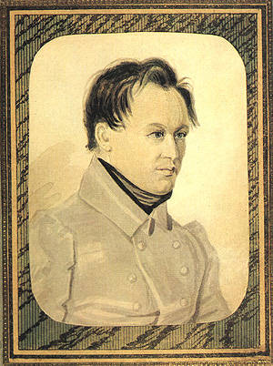 Василий Петрович Ивашев